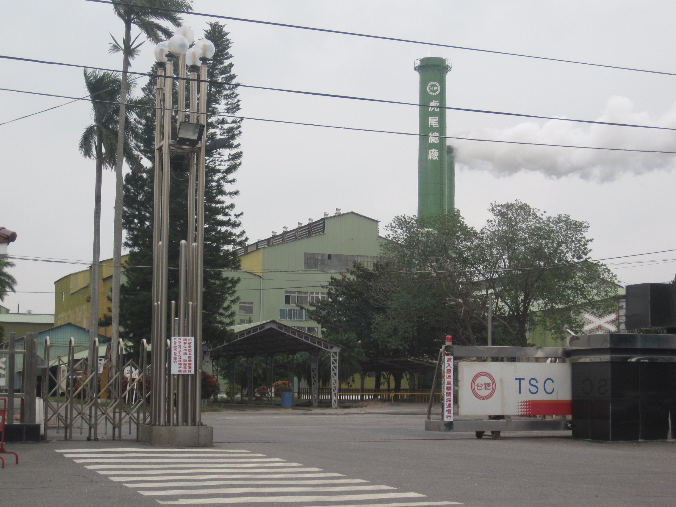 正在製糖的虎尾糖廠。